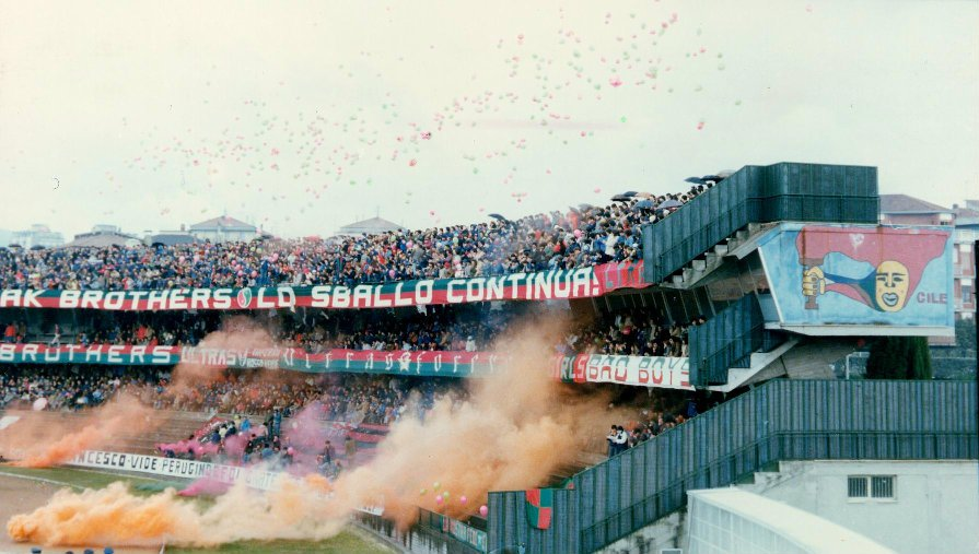 Lo stadio Libero Liberati di Terni in occasione del derby umbro tra Ternana e Foligno (2-1) valevole per la 25ª giornata del campionato italiano di Serie C1 1983-84, girone B.